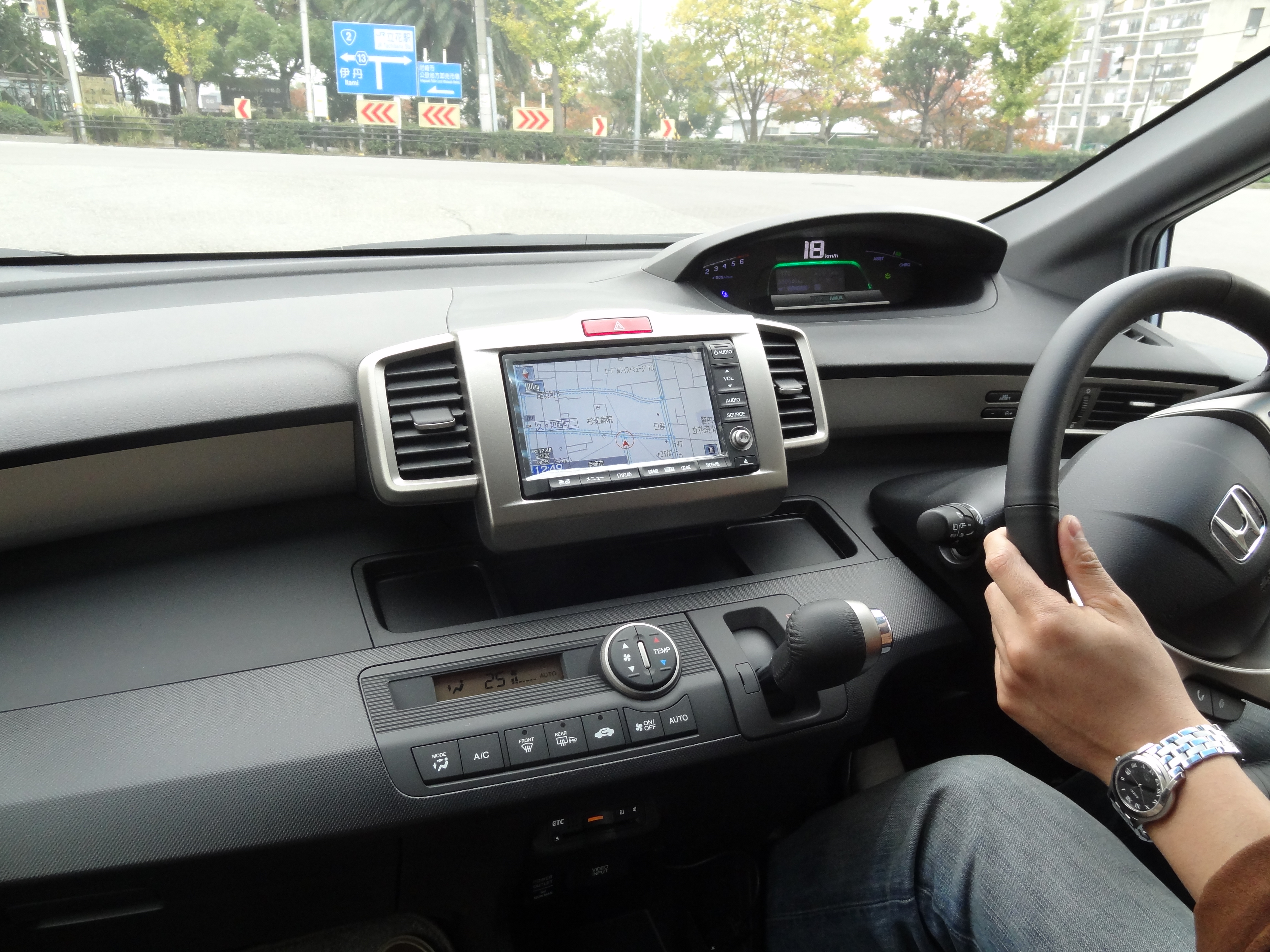 フリードスパイクハイブリッド（ダッシュボード） ナビはメーカーオプション 試乗車にて試乗中（兵庫県尼崎市内）